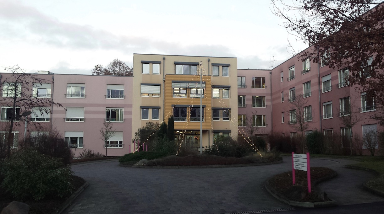 Elisabeth Jaeger Haus. Seniorenheim in Bad Kreuznach